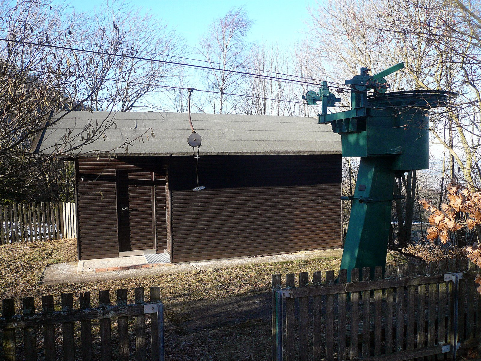 Skizentrum Simmelsberg